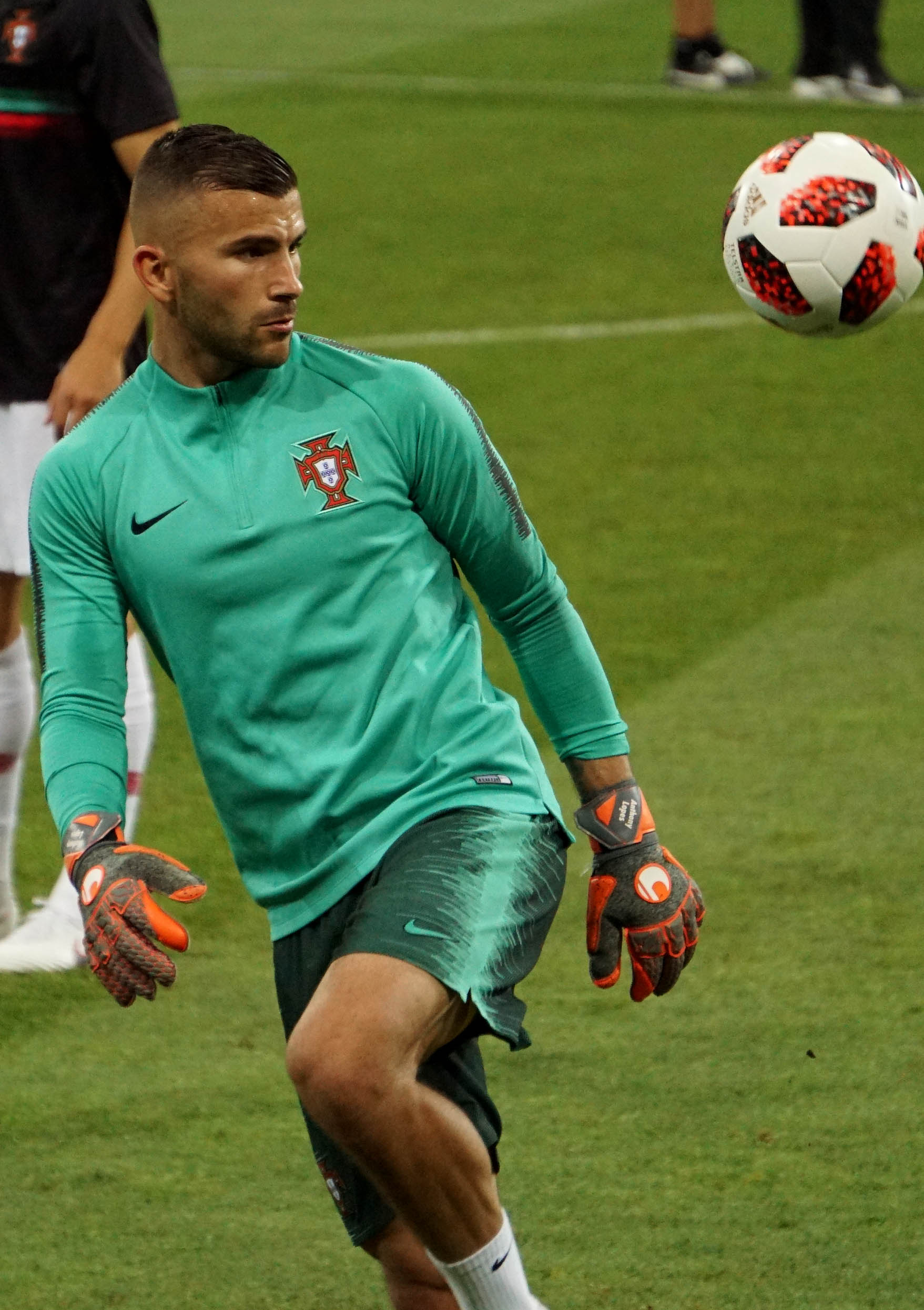 Антони Лопеш на ЧМ 2018. Сочи, Фишт. Уругвай - Португалия. 1/8 (Разминка перед матчем). Анто́ни Ло́пеш (порт. Anthony Lopes; 1 октября 1990, Живоре, Рона-Альпы, Франция) — португальский футболист, вратарь клуба «Олимпик Лион» и сборной Португалии. Чемпион Европы 2016 года, двукратный серебряный призёр чемпионата Франции.